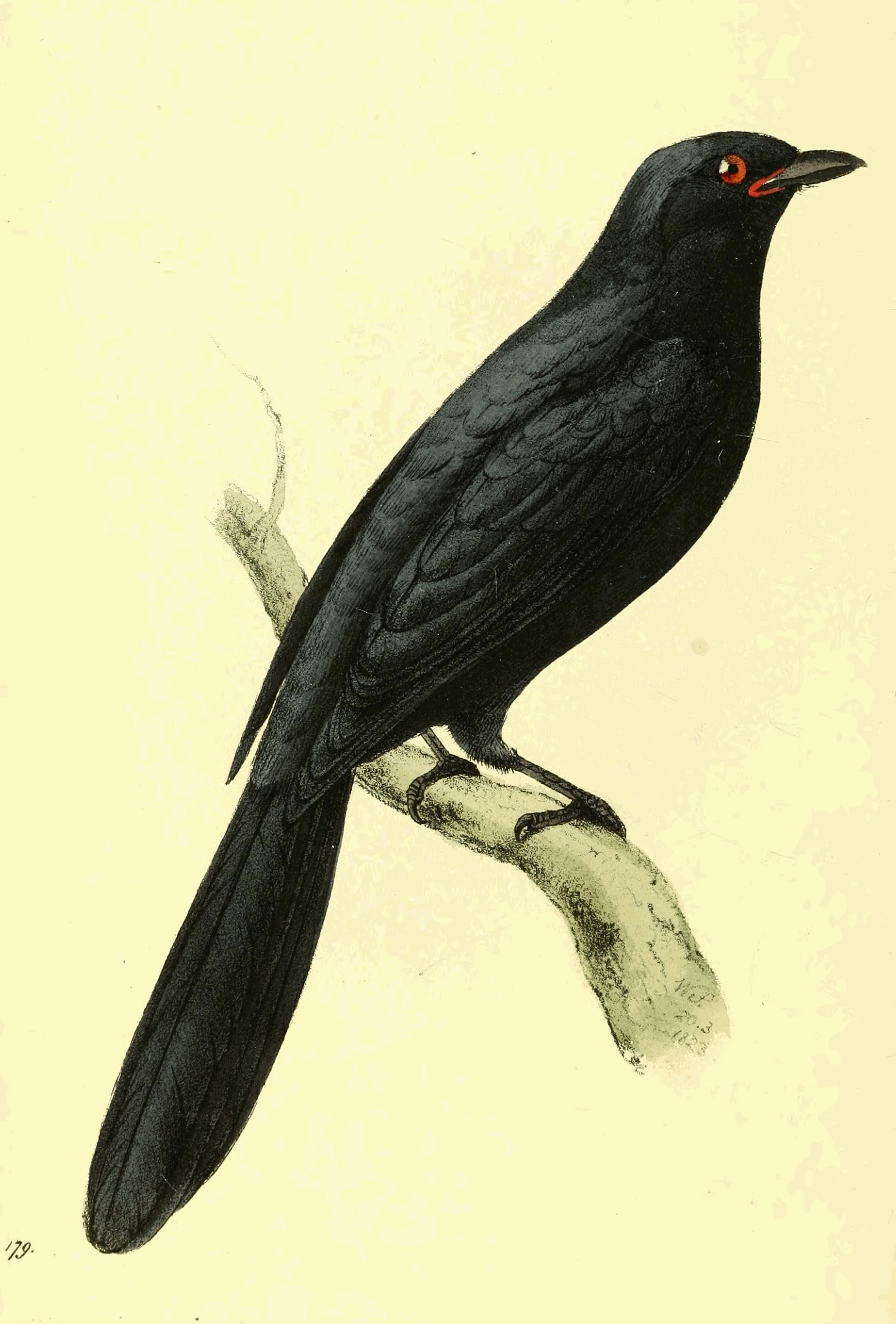 Plate 179. Muscipeta labrosa. Red-lipped Flycatcher. = Lanicterus swainsonii[1] = Campephaga flava[2]